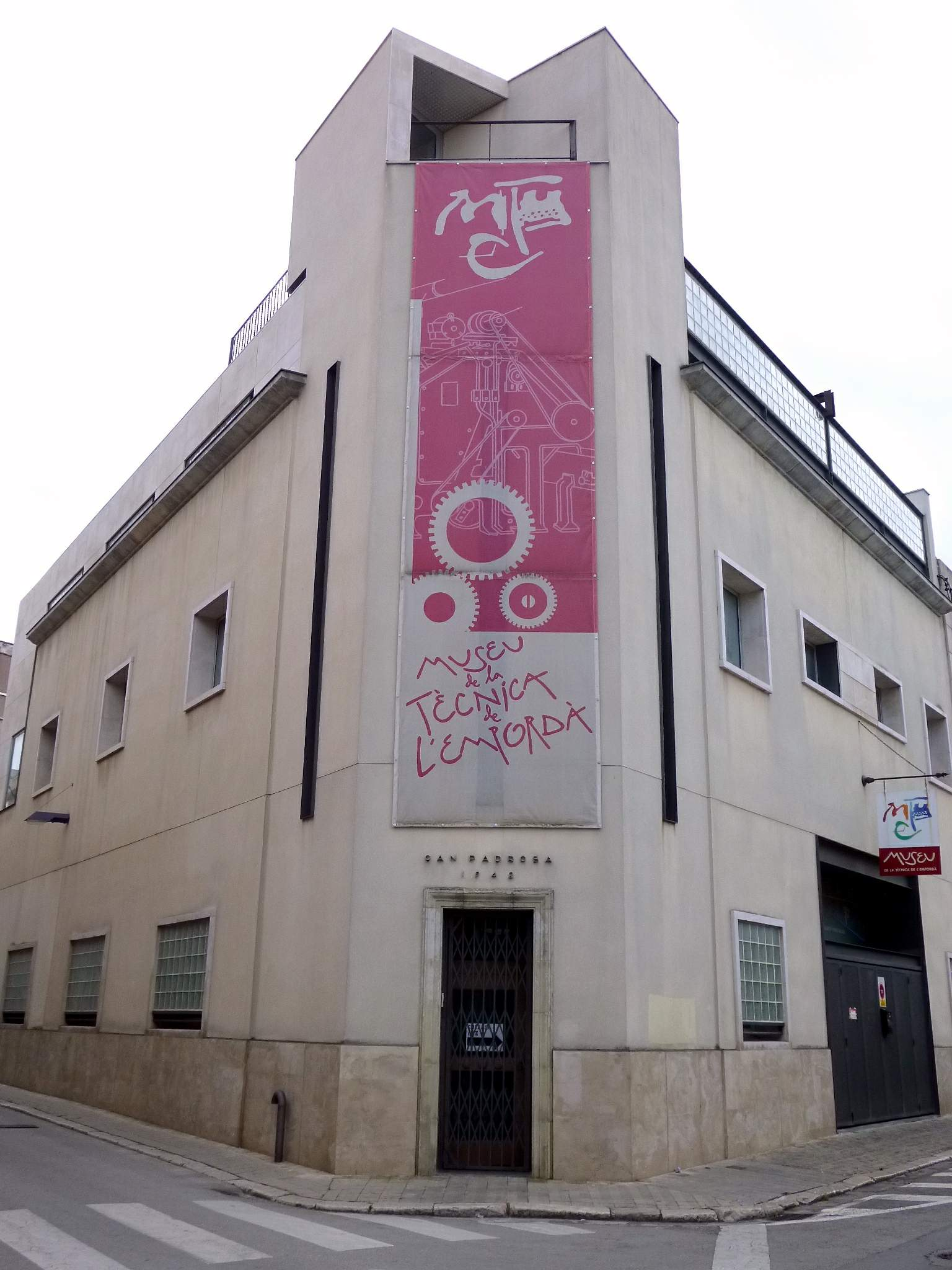 Museu de la Tècnica de l'Empordá (Figueres, provincia de Gerona).